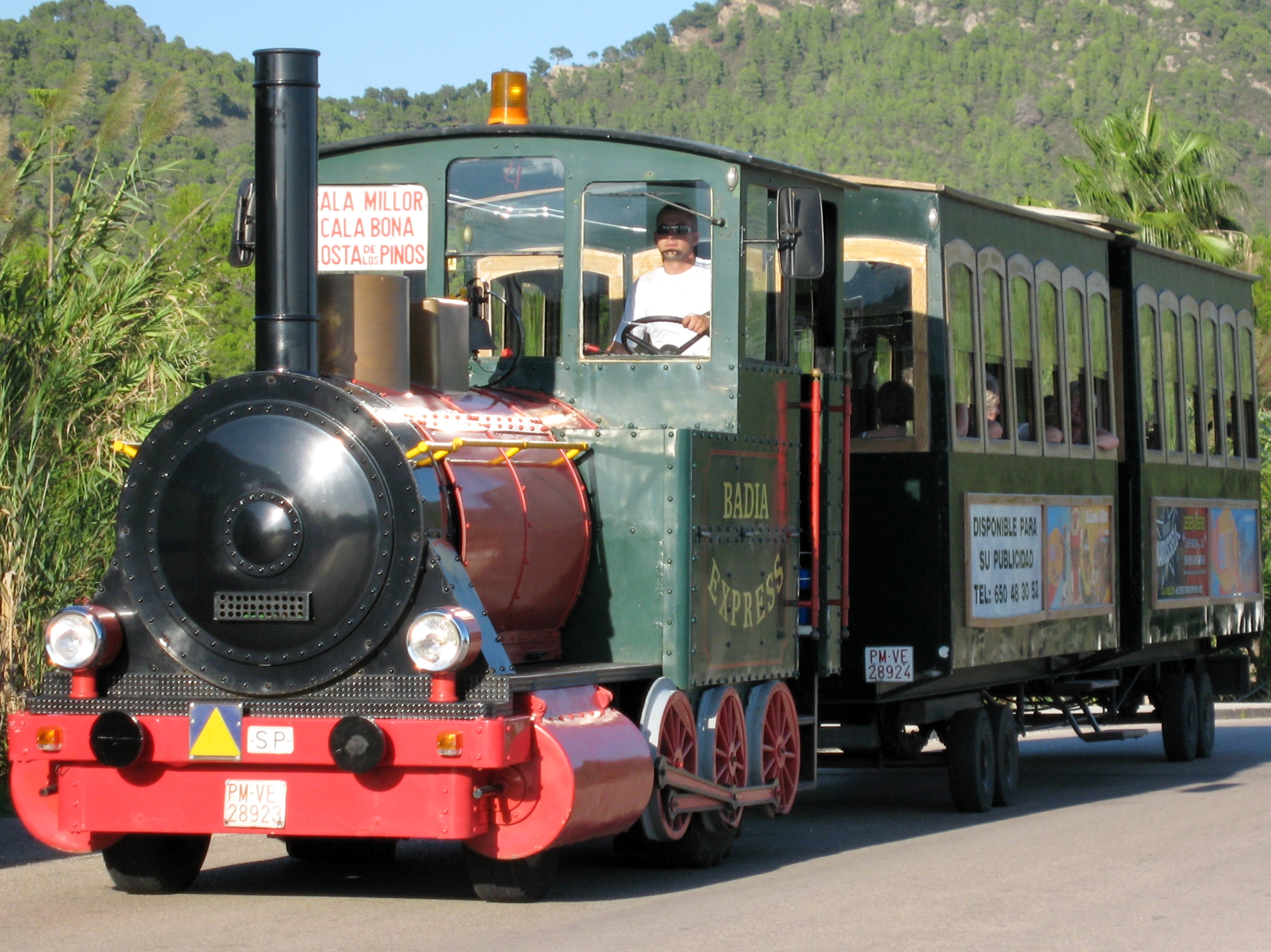 Minitren "Badia Express", Sa Marjal, Son Servera, Mallorca, Spanien